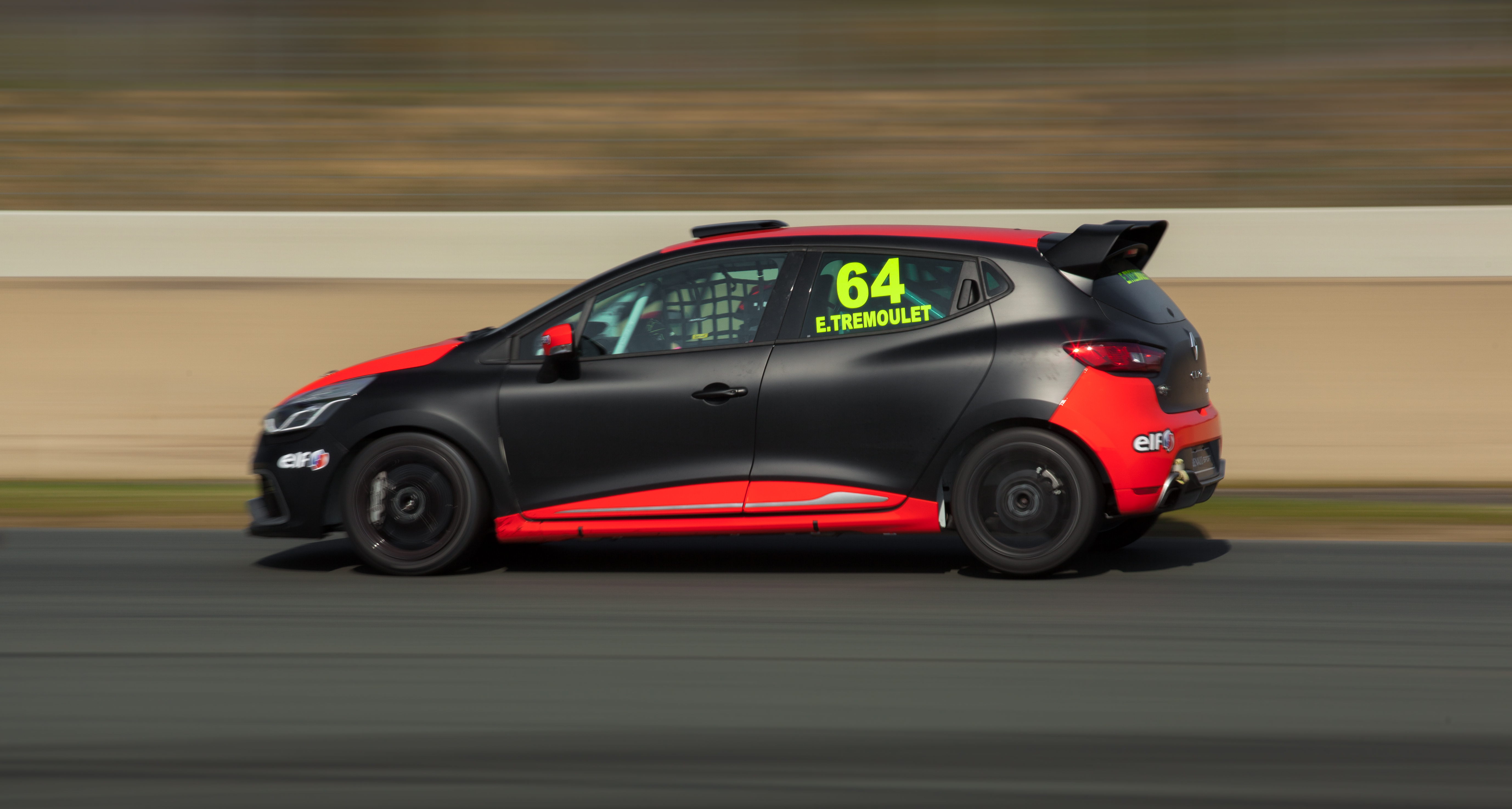 Passionné de sport auto depuis tout jeune, Eric débute en karting à l'âge de 10 ans où il s'illustre rapidement en montant sur le podium dès sa 1ère course. Avec l'aide de ses parents et d'amis il arrive à s'imposer dans les championnats régionaux, puis réalise des coups d'éclats en championnat de France en accédant par 2 fois à la deuxième marche du podium, mais faute de moyens suffisants il ne peut espérer aller plus loin.